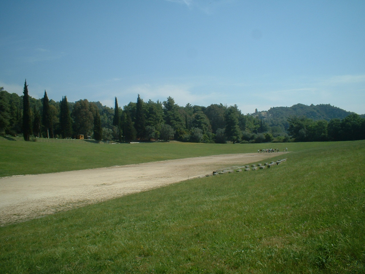 Sicilianu: Stadiu di Olimpia ntô 2007